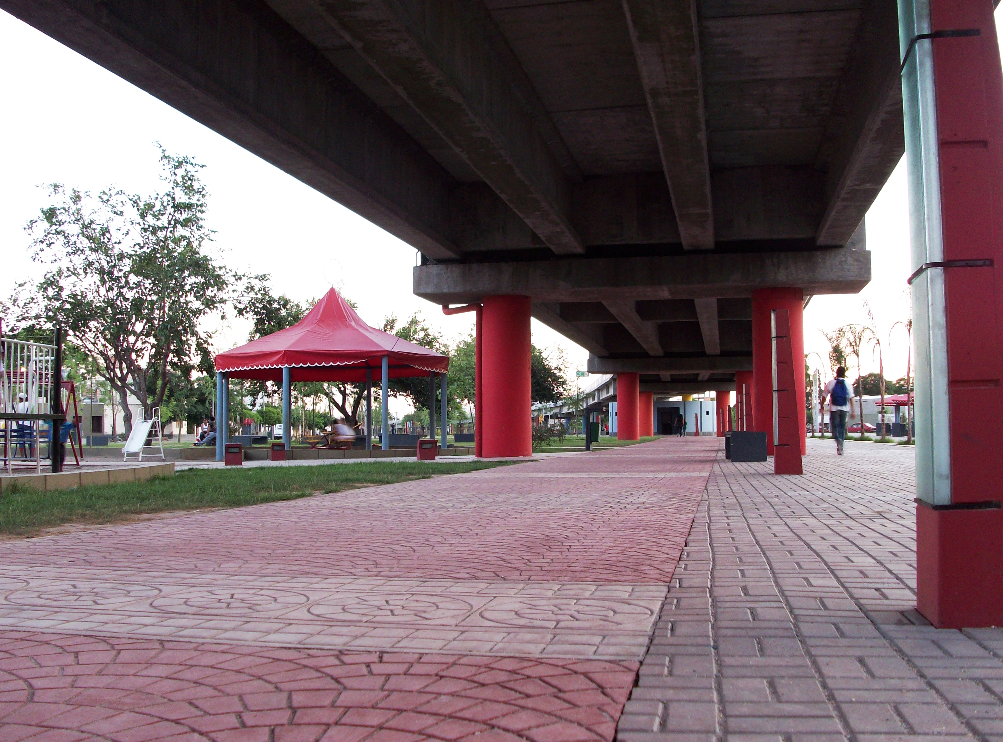 Paseo del viaducto de la terminal de Santiago del Estero